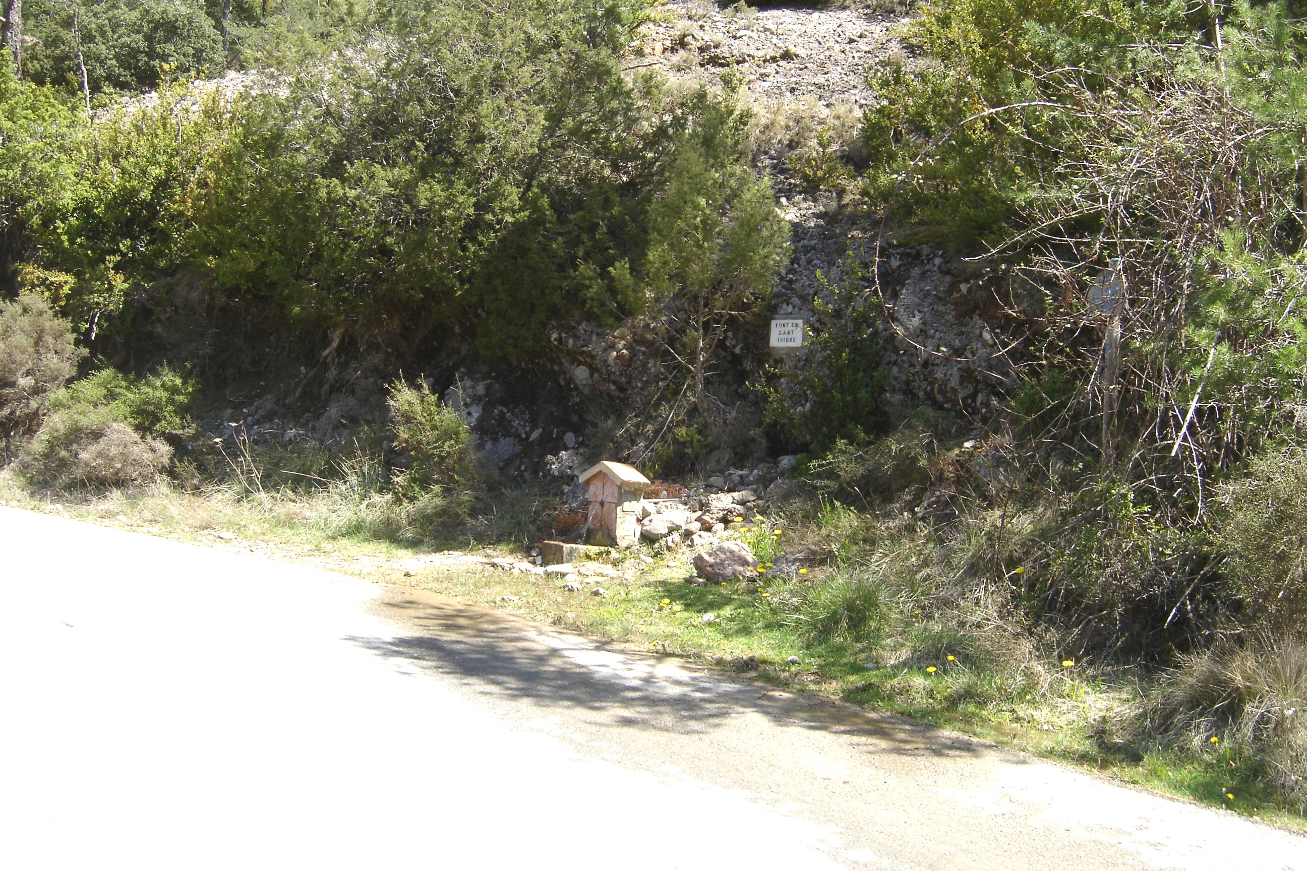 La font de Sant Isidre, al terme municipal de Guixers (Solsonès).